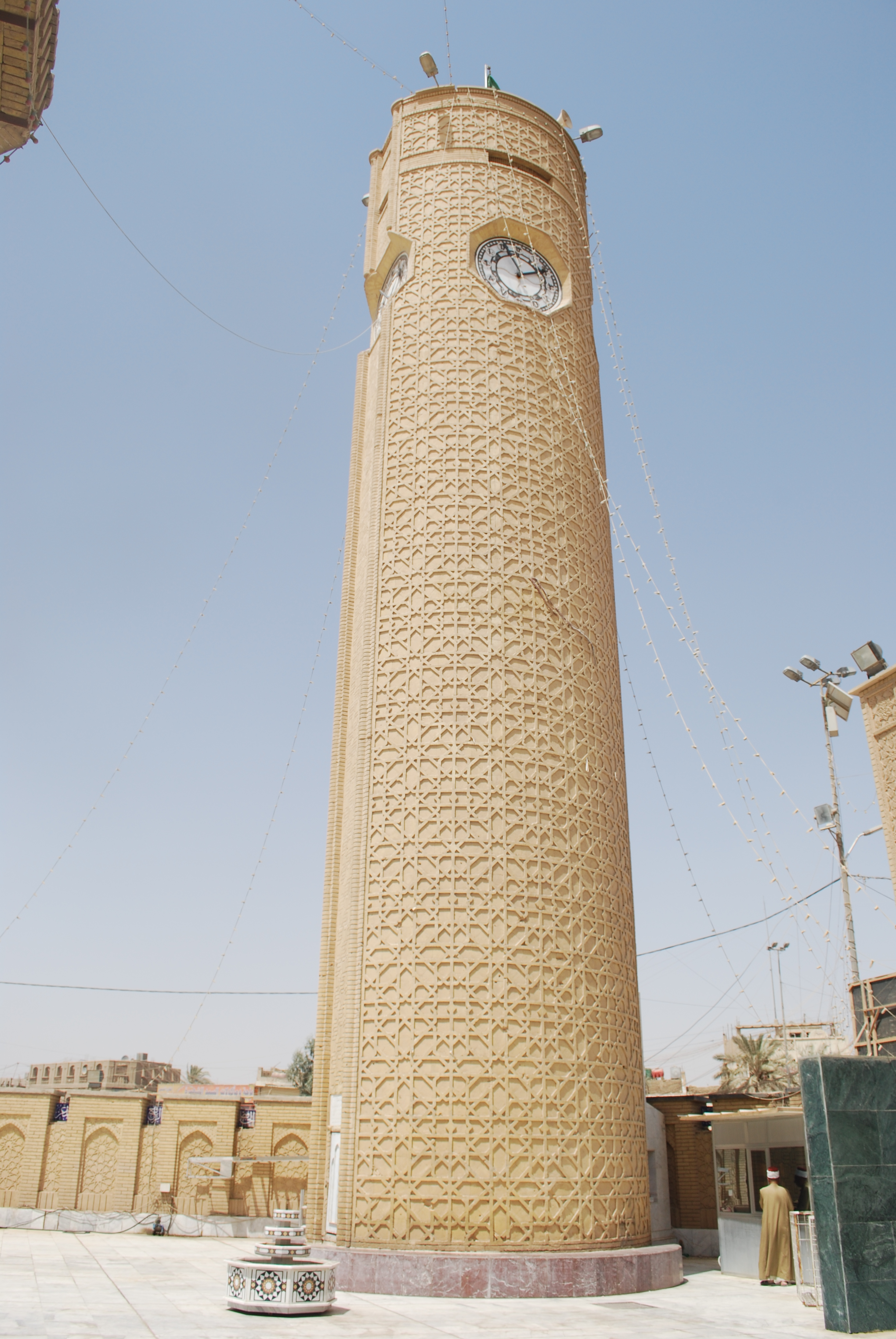 الساعة الأعظمية ، في جامع الإمام الأعظم ، أبو حنيفة النعمان رحمه الله